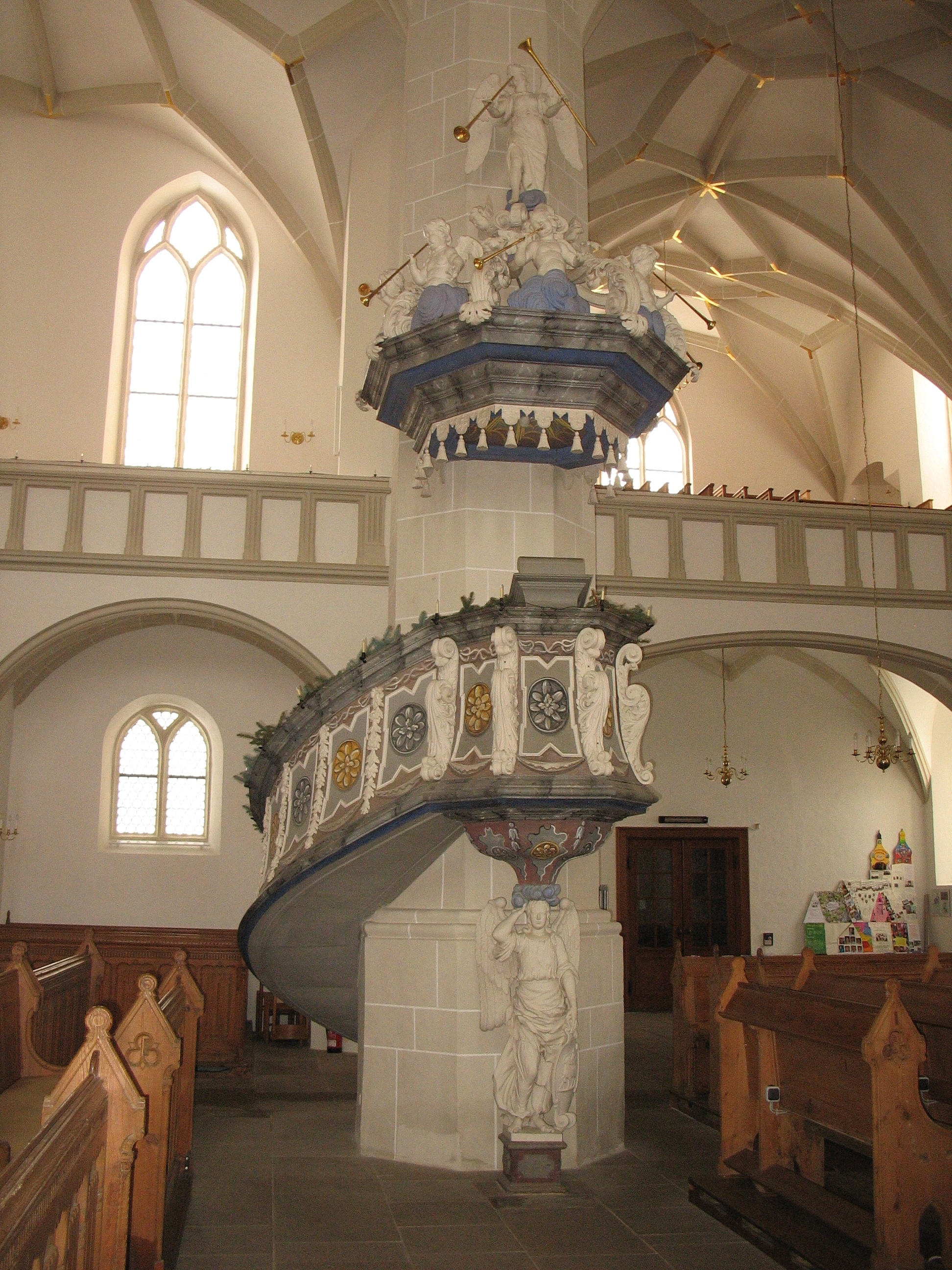 Plauen, St. Johanniskirche: Kanzel